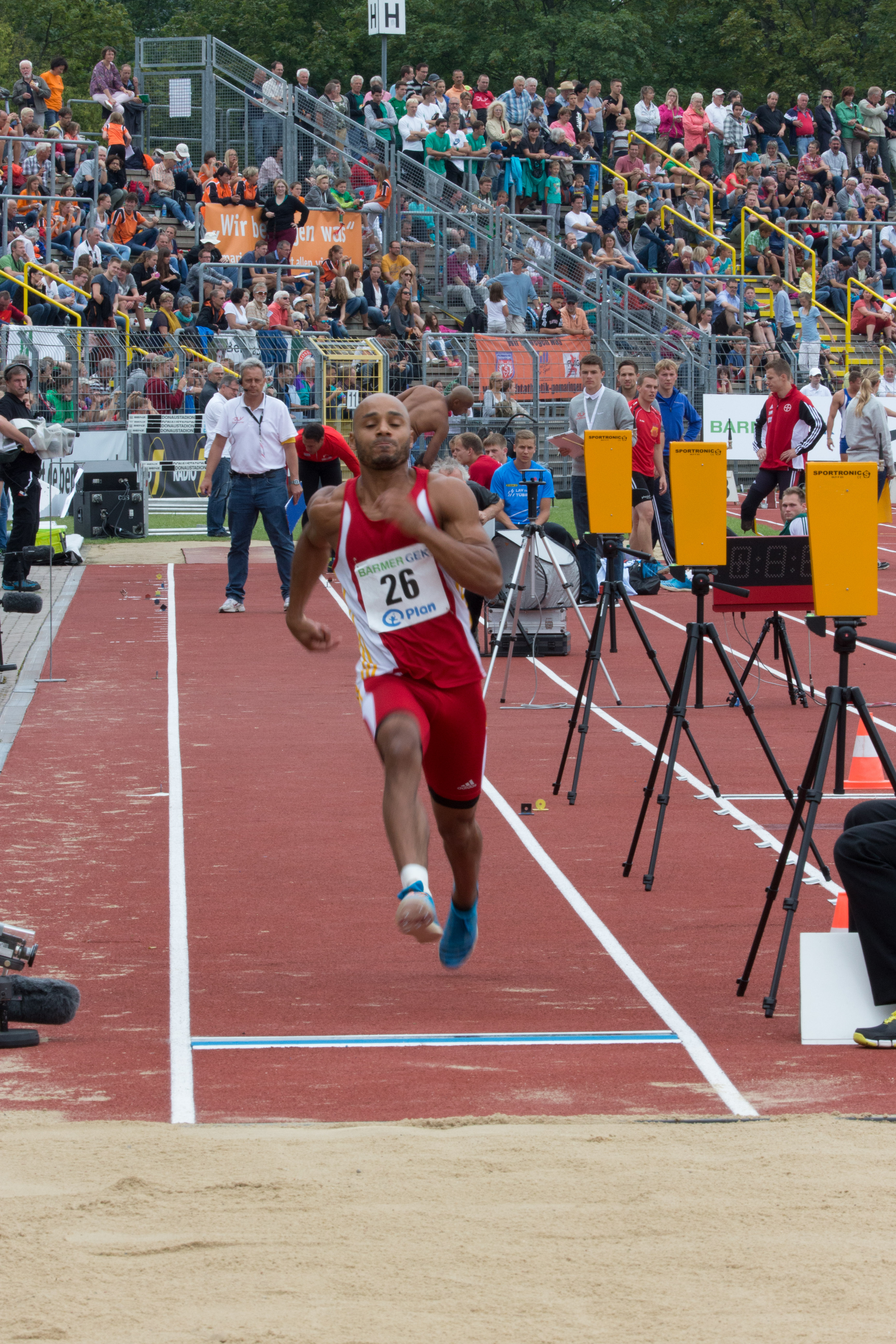 114. Deutsche Leichtatheltik Meisterschaften 2014 in Ulm - Weitsprung Männer: Julian HOWARD - Alle Ergebnisse/Teilnehmer unter